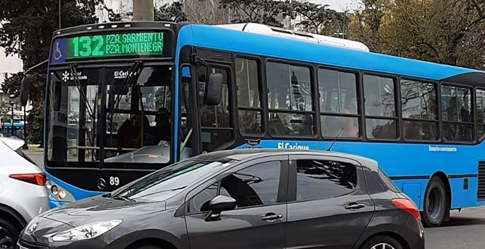 Omnibus Mercedes-Benz de la línea 132, explotada por la empresa El Cacique Ros